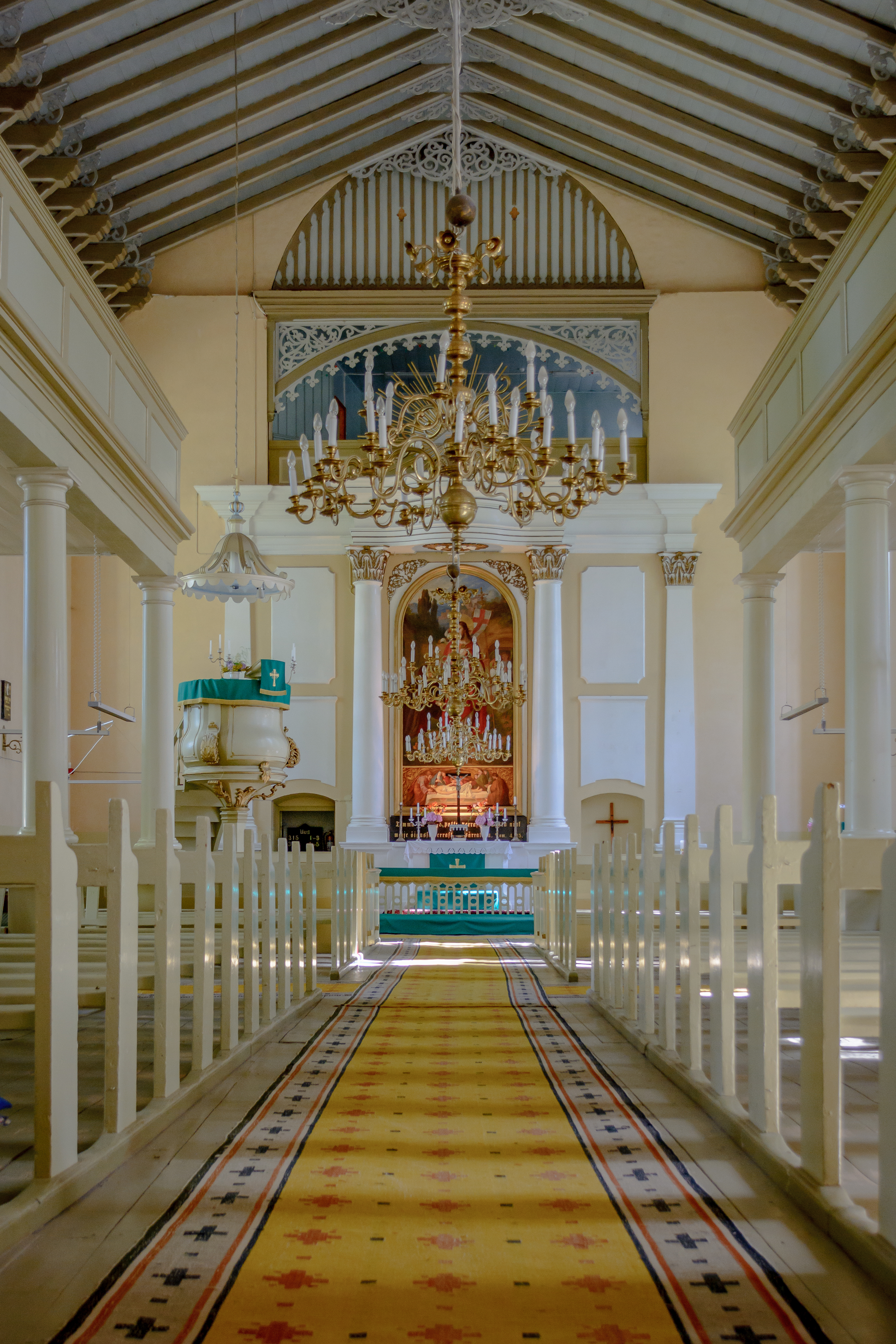 Räpina Miikaeli kirik